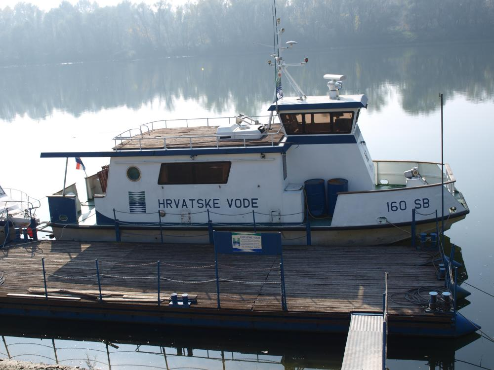 Splav na rijeci Savi u Slavonskome Brodu (podno Brođanke).